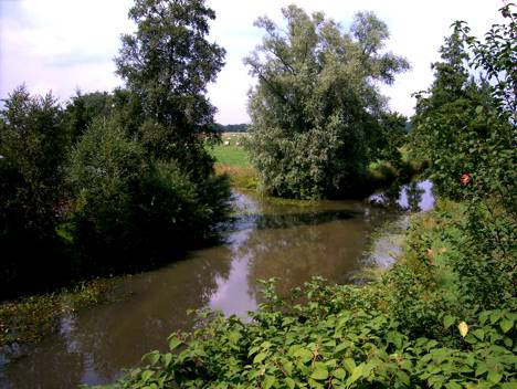 Mündung des Oste-Hamme-Kanals in die Hamme bei Viehspecken. Von Links fließt der Giehler Bach, von rechts der Kanal in die Hamme